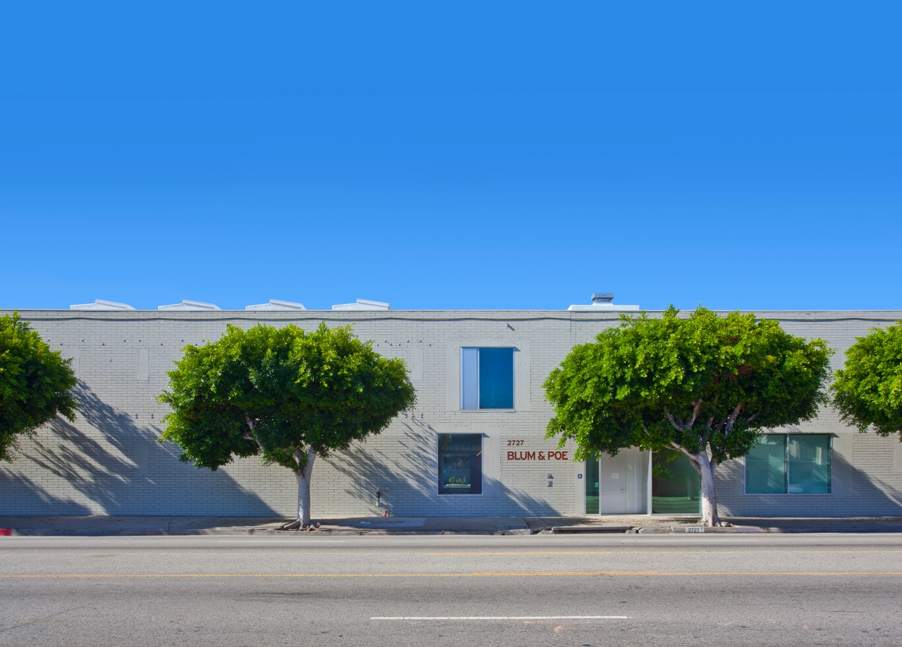 Courtesy of Blum & Poe